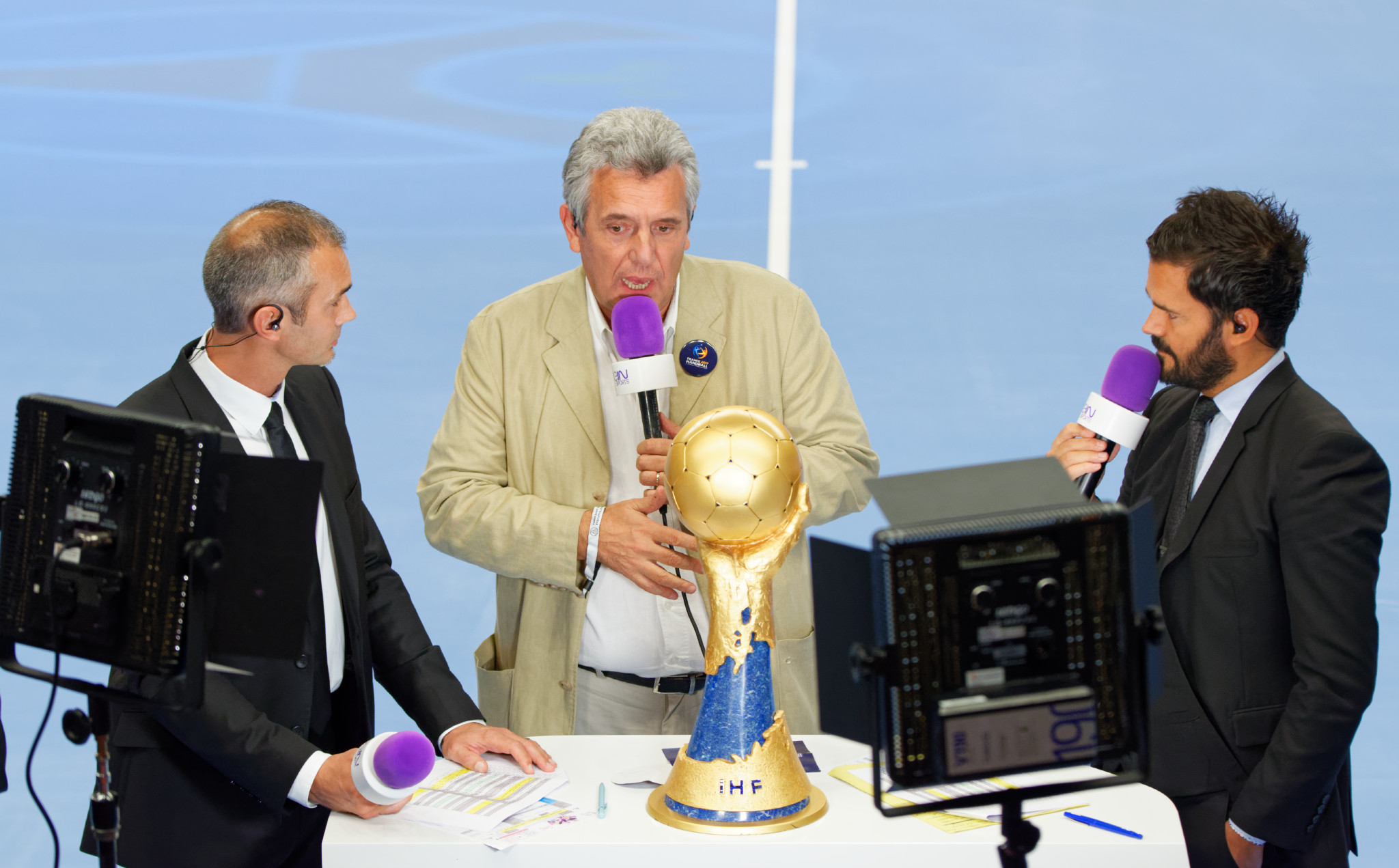 Claude Onesta, encore entraîneur de l'équipe de France masculine de handball pour un an, présente le trophée qui sera remis au vainqueur du championnat du monde masculin 2017 organisé par la France en janvier 2017. Devant les caméras de la chaîne BeInSports avec François-Xavier Houlet (à gauche) et Thomas Villechaize, à Coubertin le 23 septembre 2015 pour le match PSG/Nîmes.